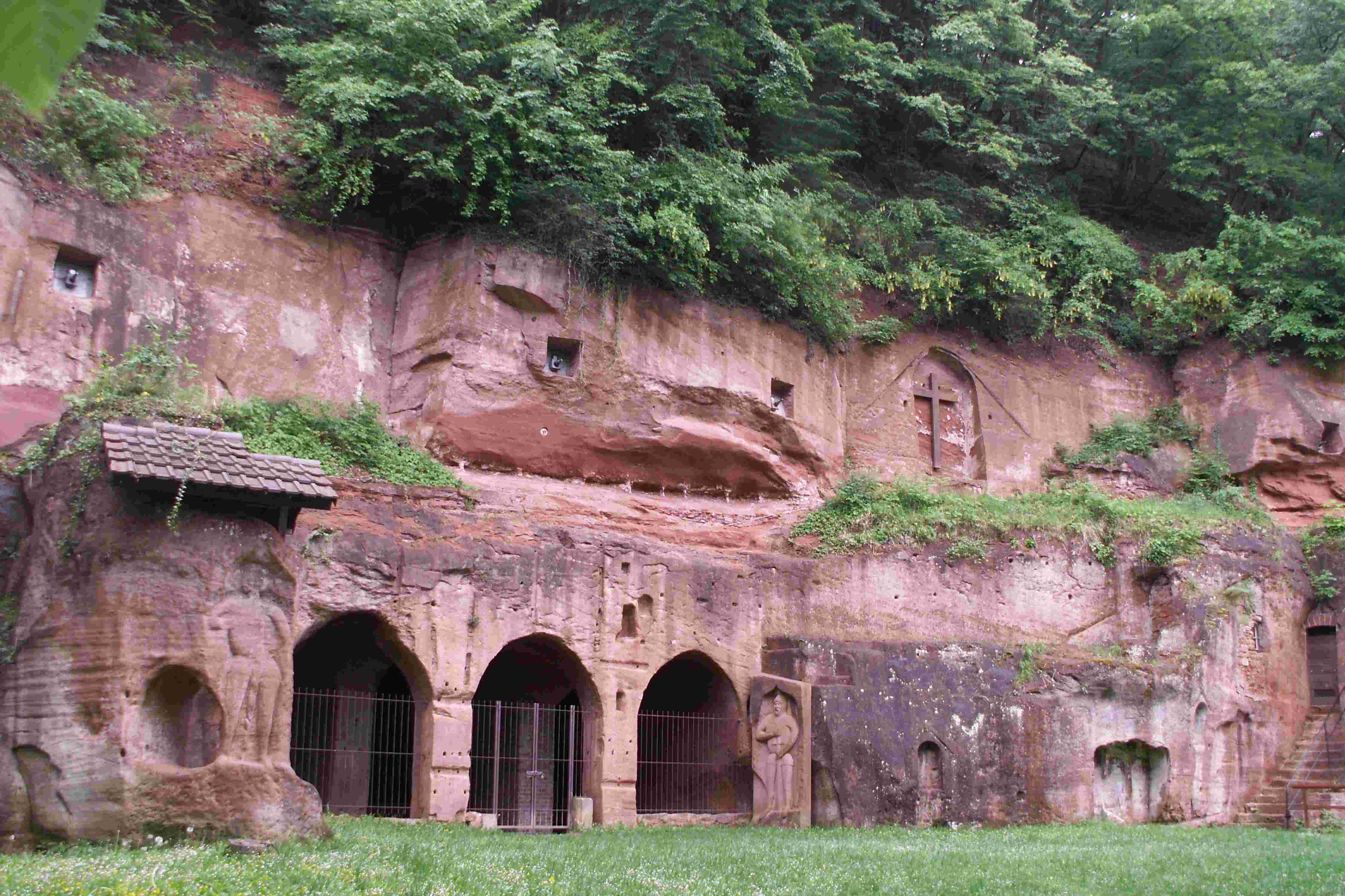 Felseneremitage, sogenannte Antonius-Klause; aus dem Felsen gehauene Teile einer romanischen dreischiffigen Kirche; an der Felswand mittelalterliches Relief; ehemalige Eremitenwohnung 1759–61 in Bretzenheim Landkreis Bad Kreuznach.